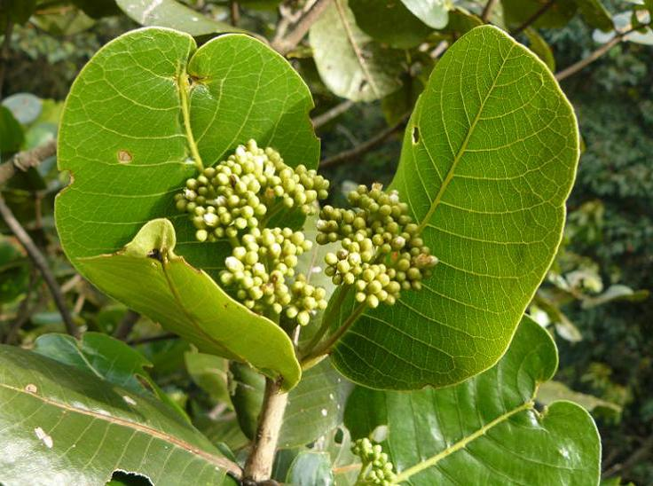 Nombre común: “Lizcano”. Ubicación: Sendero nuevo hacia la Torre de observación, antes de llegar a Fenologia. Abundancia en los senderos: Ocasional – Frecuente, generalmente se encuentra en las partes altas de la zona de senderos, acompañado de Quercus humboldtii, prefiriendo las zonas secas como este. No. de colección: GT – 639. Observaciones: Posible nuevo registro para la flora de Colombia. Téllez, G (2008)